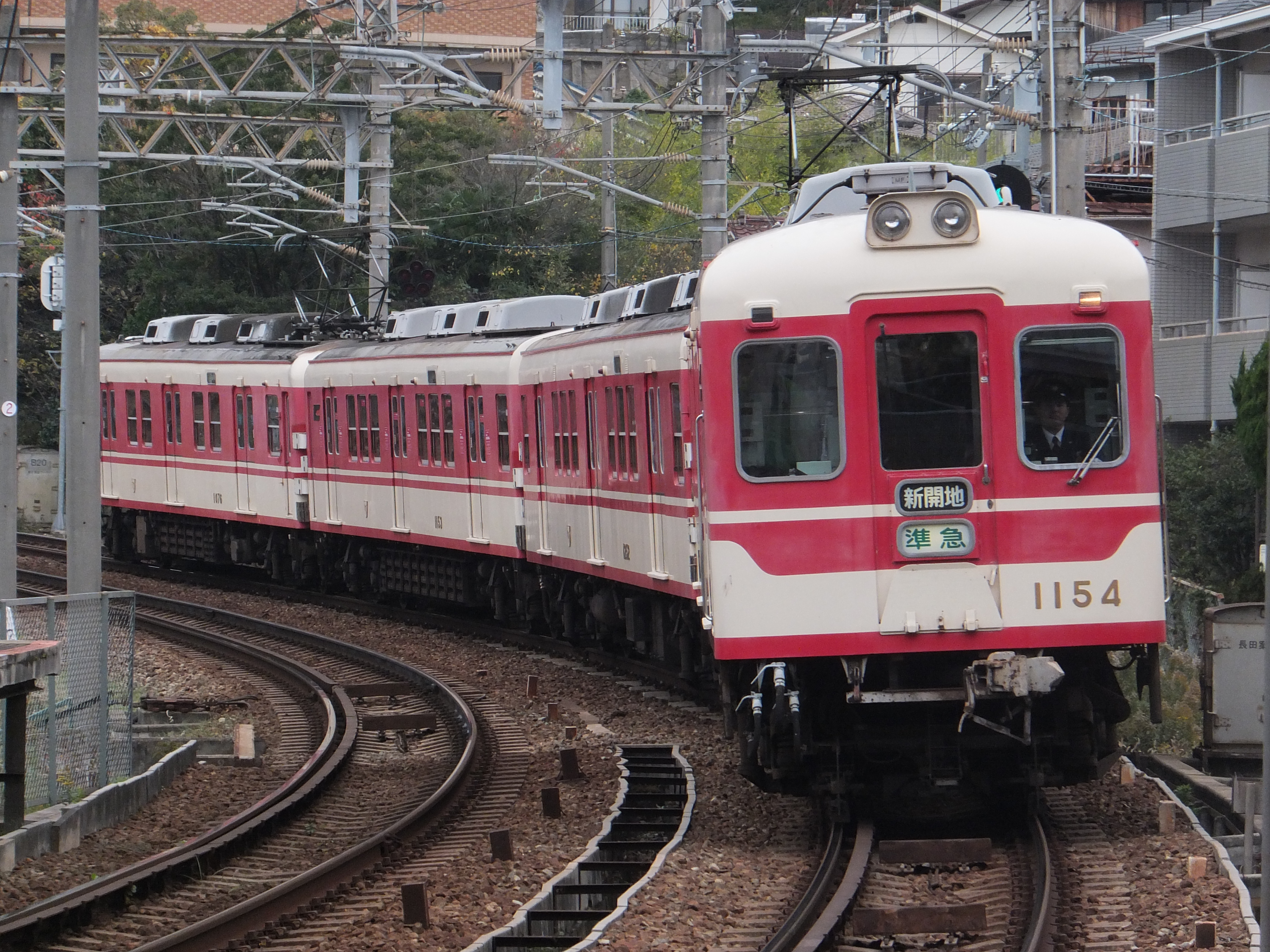 2016年11月21日、長田駅にて撮影。